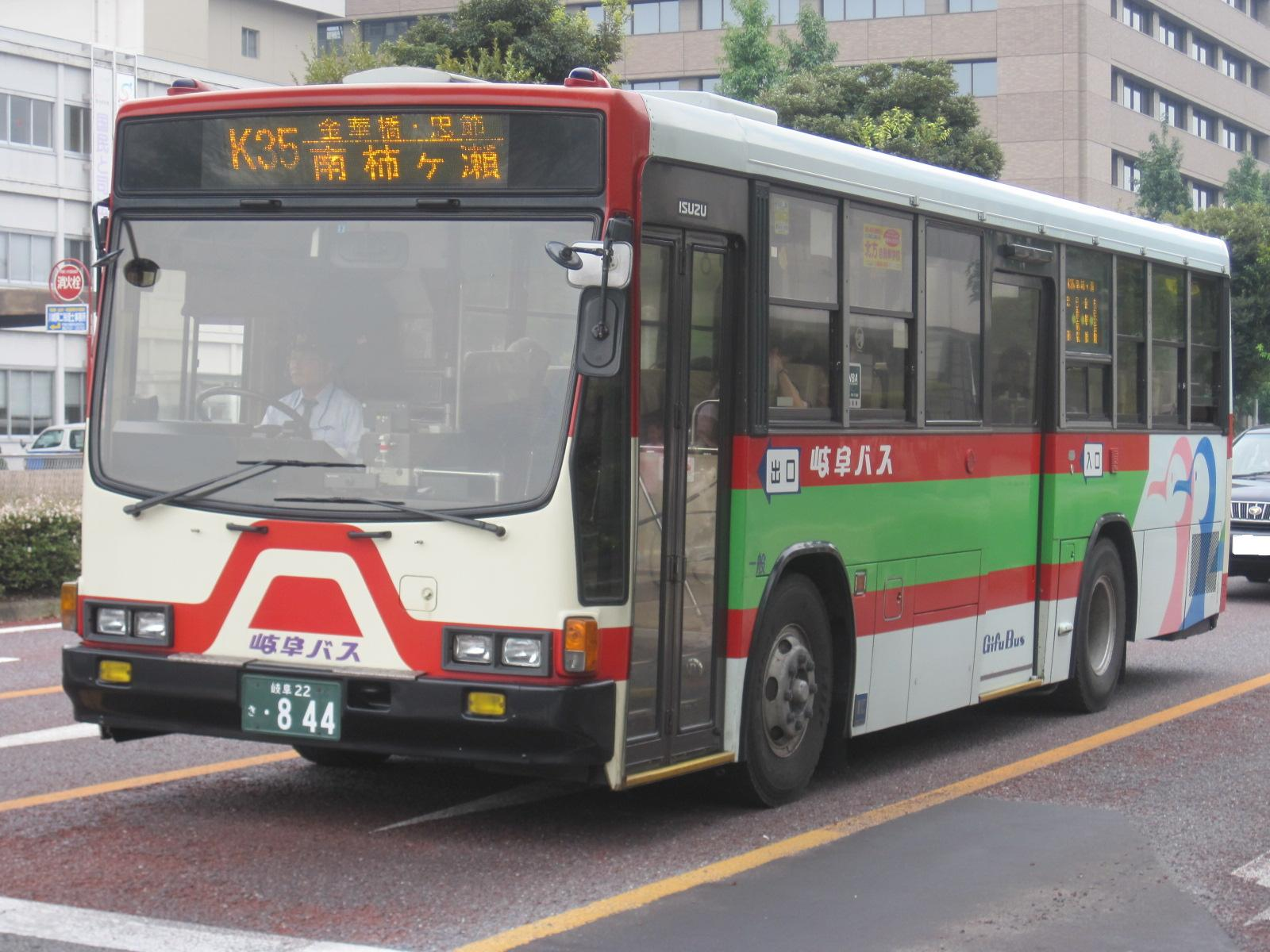 岐阜乗合自動車のいすゞキュービック。岐阜市内でかつて運行されていた岐阜市営バスの車両を継承している。